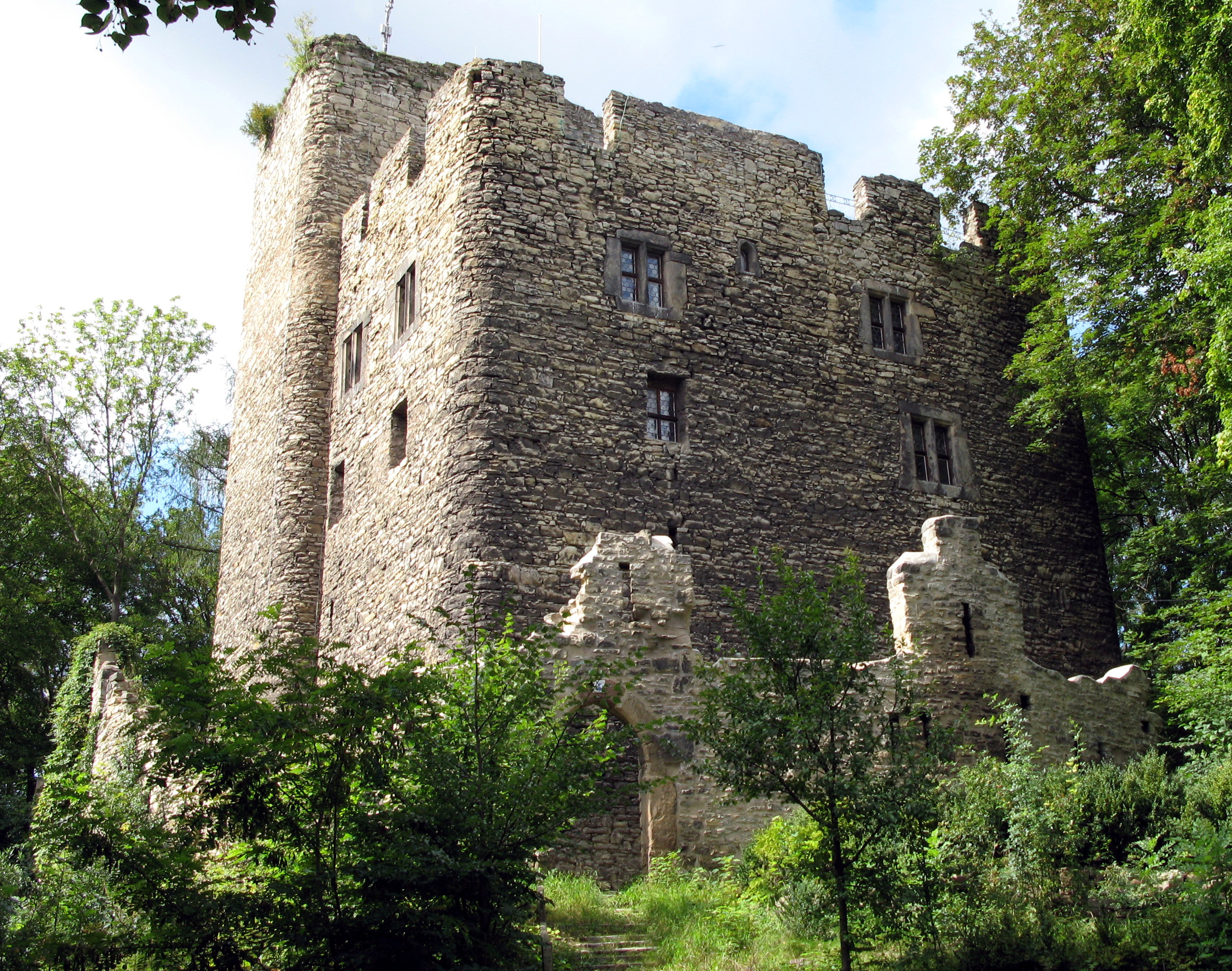 Ehrenburg über dem Städtchen Plaue in Thüringen.